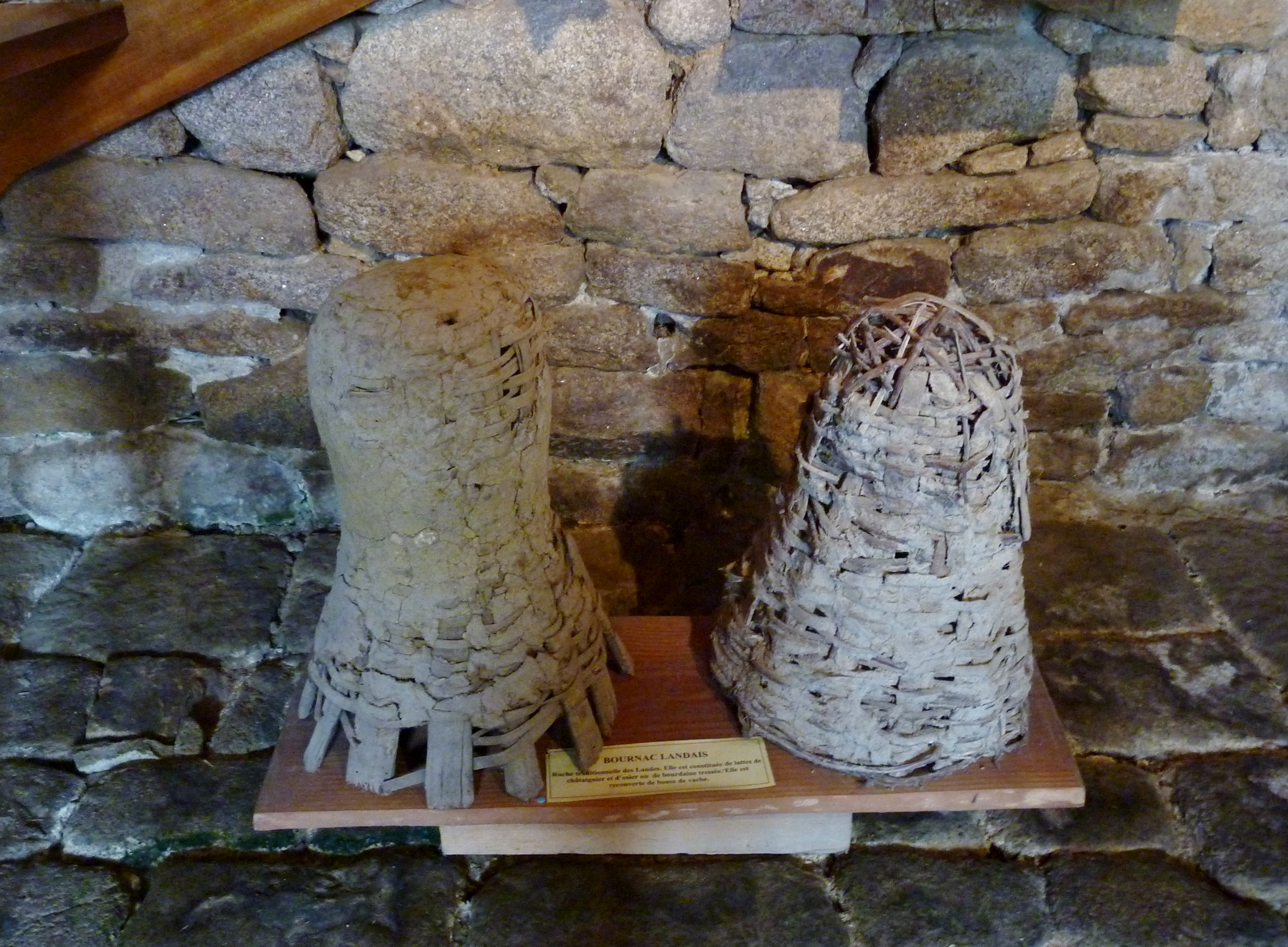 Le Faouët (Morbihan) : musée de l' Abeille Vivante et la Cité des Fourmis, ruches traditionnelles "bournac" des Landes en lattes de châtaignier et d'osier ou de bourdaine séchée, recouvertes de bouse séchée